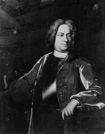 Gottfried Grawert (1670-1724) sächsischer Generalmajor